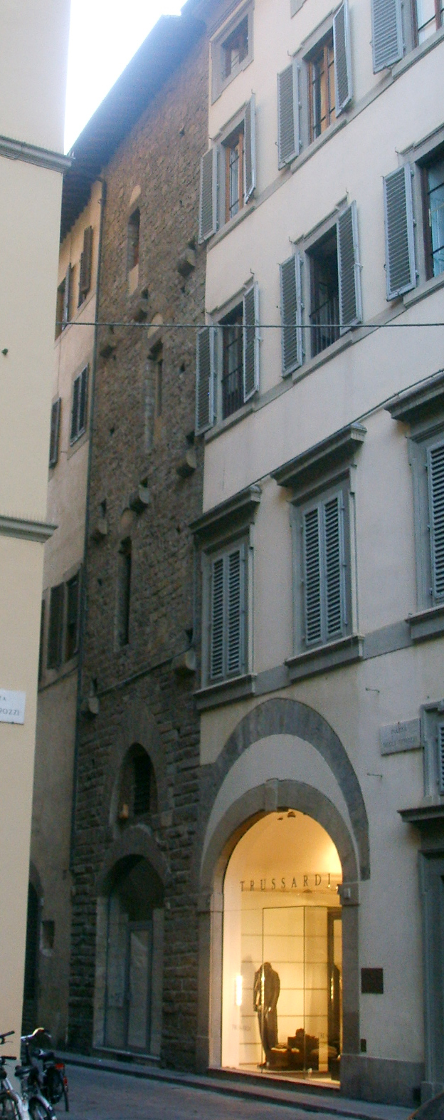 Torre_degli_Strozzi in Florence, Italy